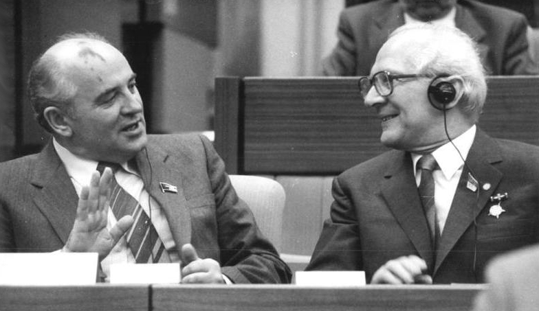 ADN-ZB-Mittelstädt-21.4.86-pra-Berlin: XI. SED-Parteitag- Der Generalsekretär des ZK der SED, Erich Honecker, und der Generalsekretär des ZK der KPdSU, Michail Gorbatschow, während des XI. Parteitages der SED. Information added by Wikimedia users.